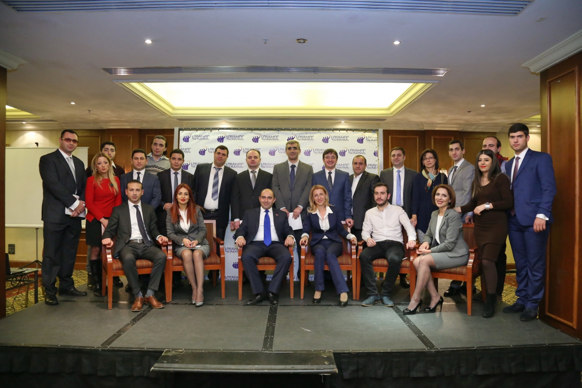 Լուսավոր Հայաստան Կուսակցության Հիմնադիր Համագումար